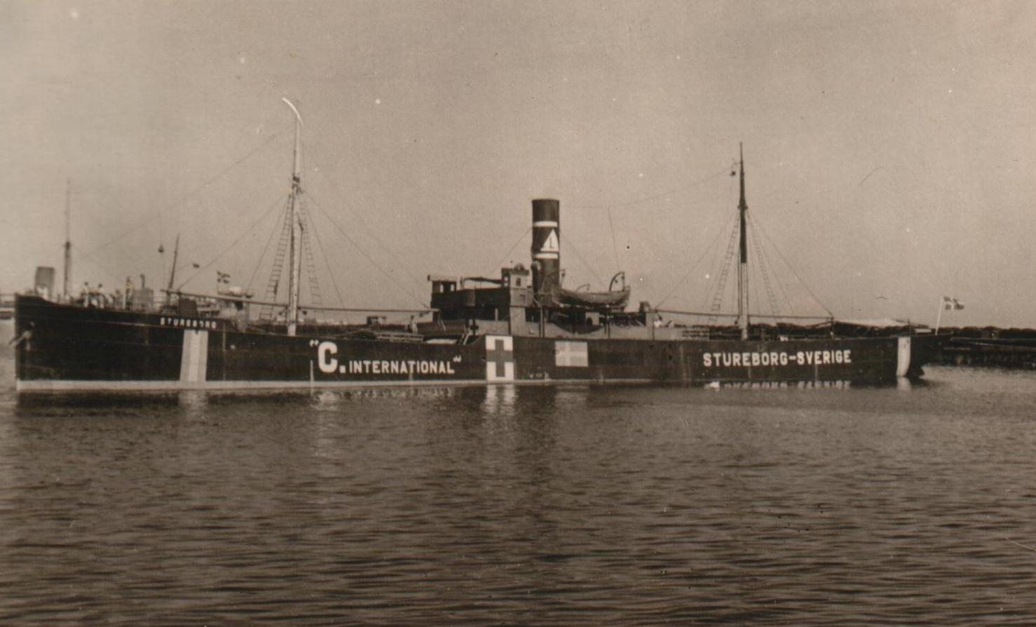 A picture of Steamship Stureborg